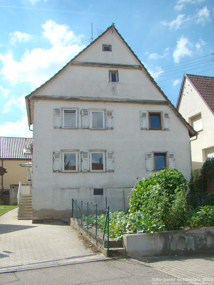 Denkmalgeschütztes Wohnstallhaus Kirchstr. 17 in Heilbronn-Frankenbach